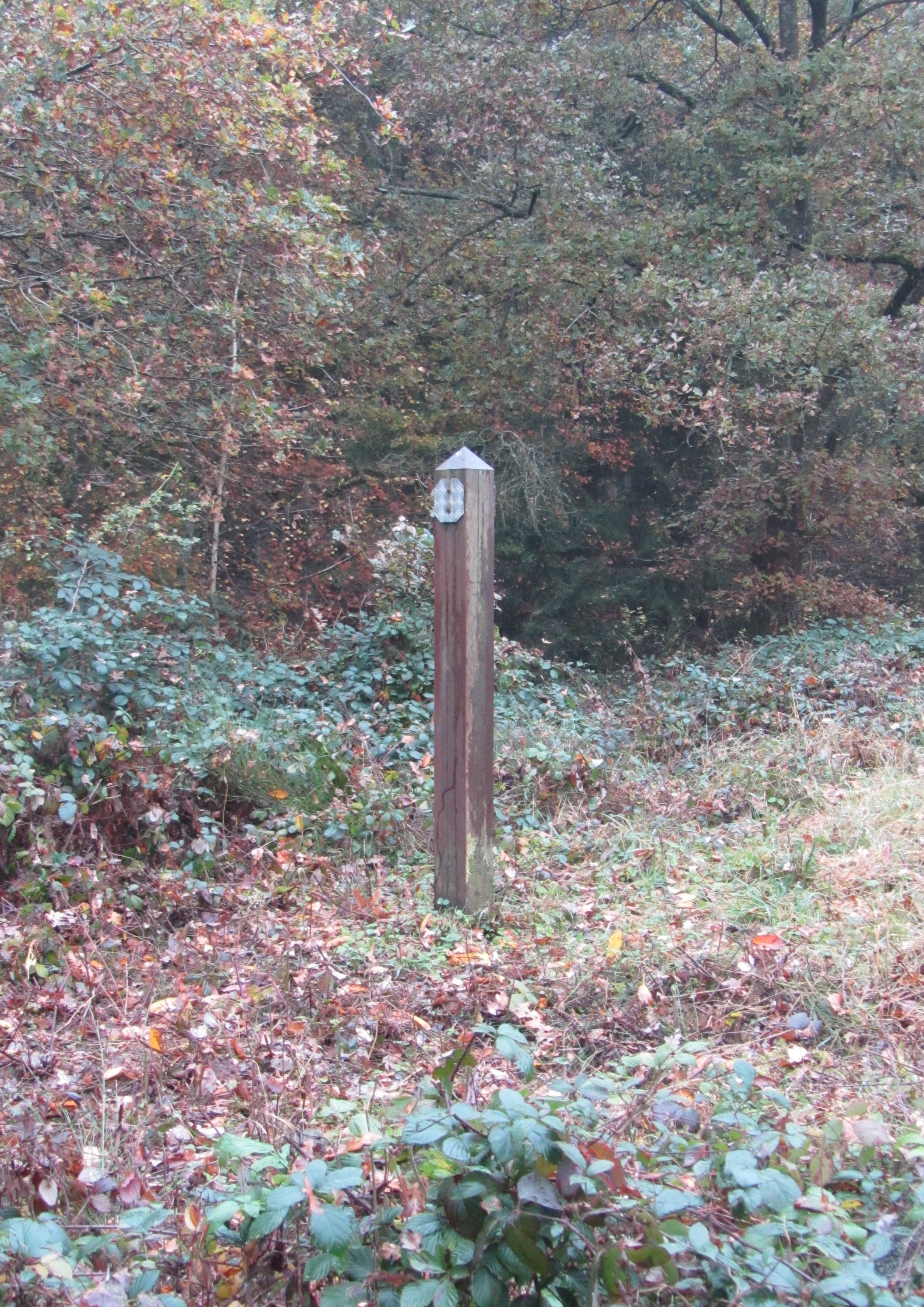 Dorothee von Windheim: "ohne Titel" (1987/88), Straße der Skulpturen, St. Wendel, Saarland, Material: Eisen, Höhe 110 m, ursprünglich auch gelber Sandstein in Stücken auf einer Fläche von 180 x 200 cm, zwei Glasscheiben (inzwischen durch zwei Bleche ersetzt)